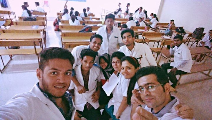 Students